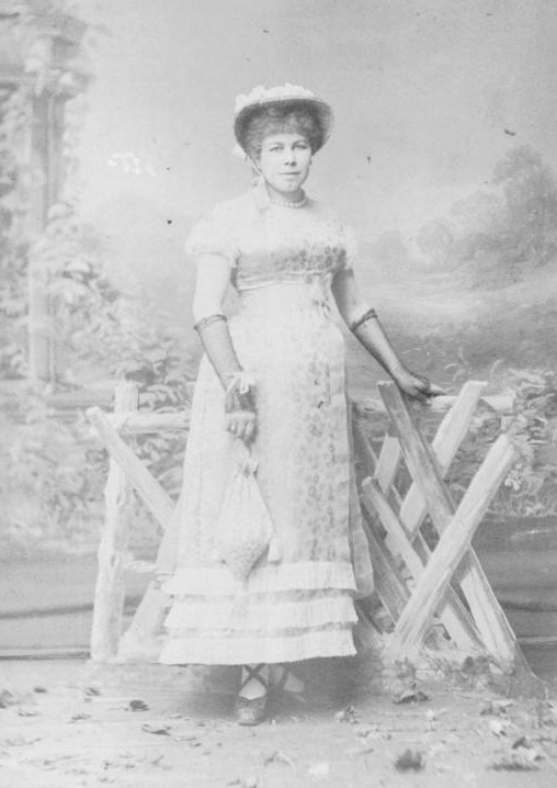 Pauline Horson (1858-1918), nee Dyckhoff, german singer, married with Moritz Gottfried Brügelmann (1849-1920)